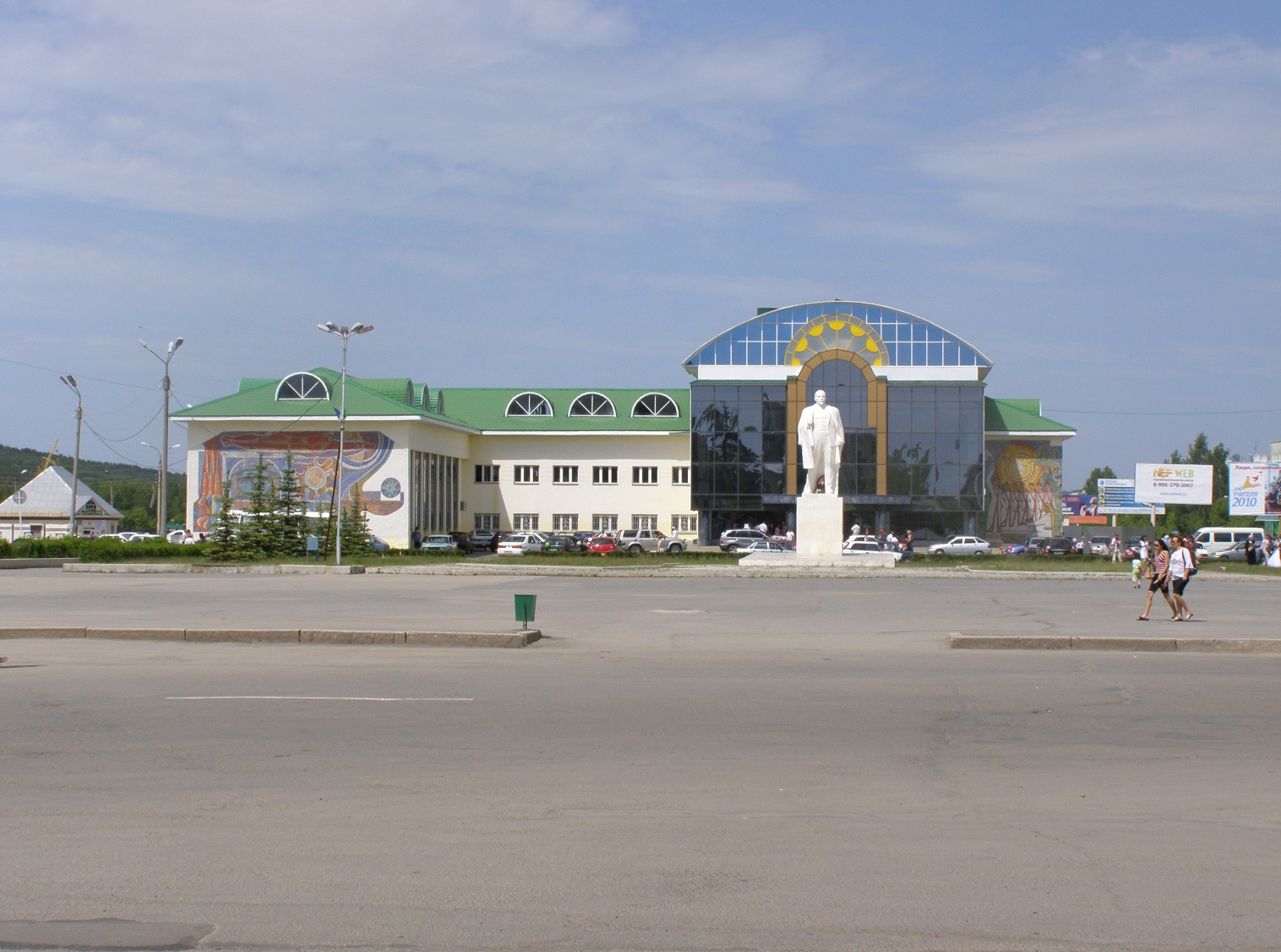 Площадь им. Ленина, филармония (город Учалы)